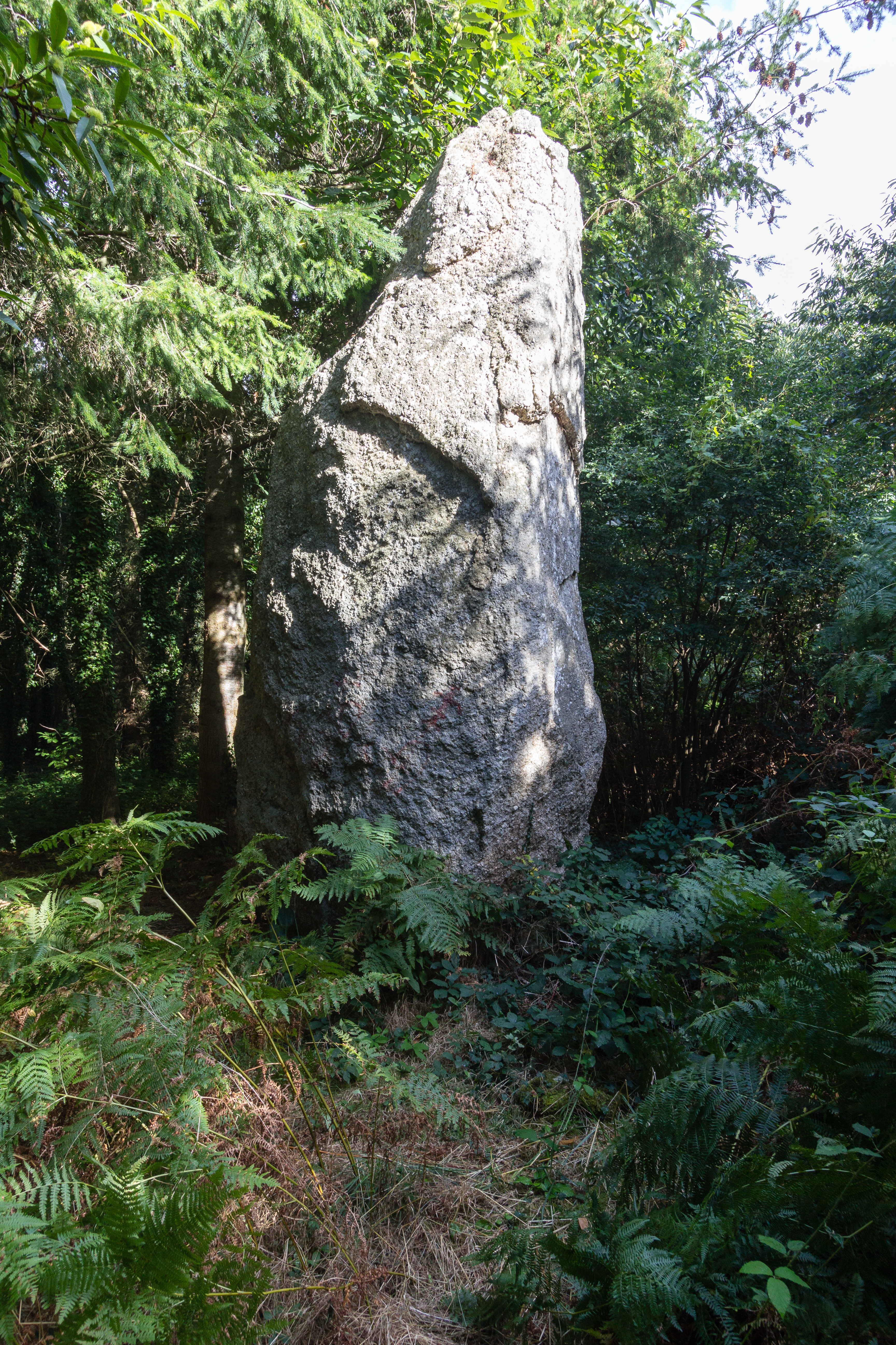 Menhir de la Roche-Longue à Saint-Julien (France).